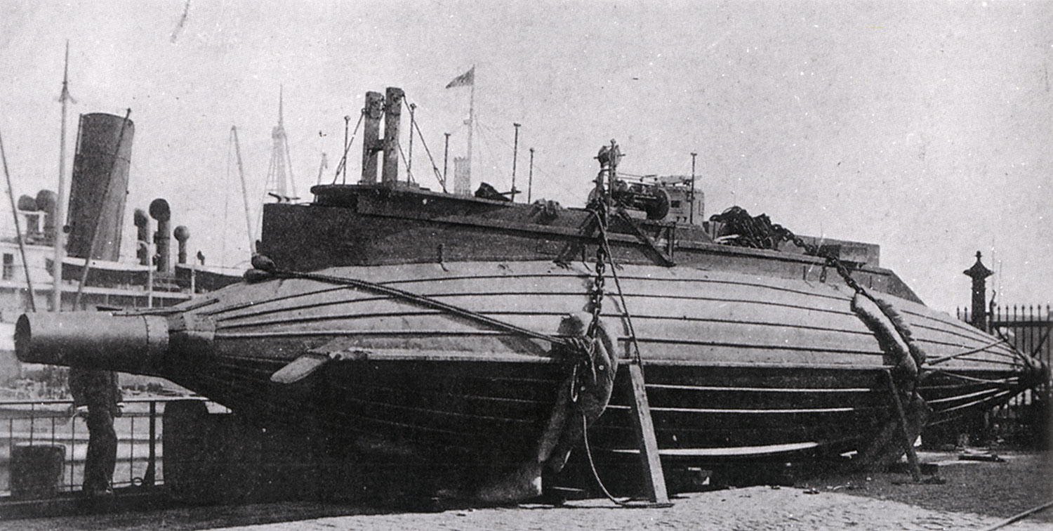 Versuchs-U-Boot der Howaldtswerke Kiel mit der Baunummer 333